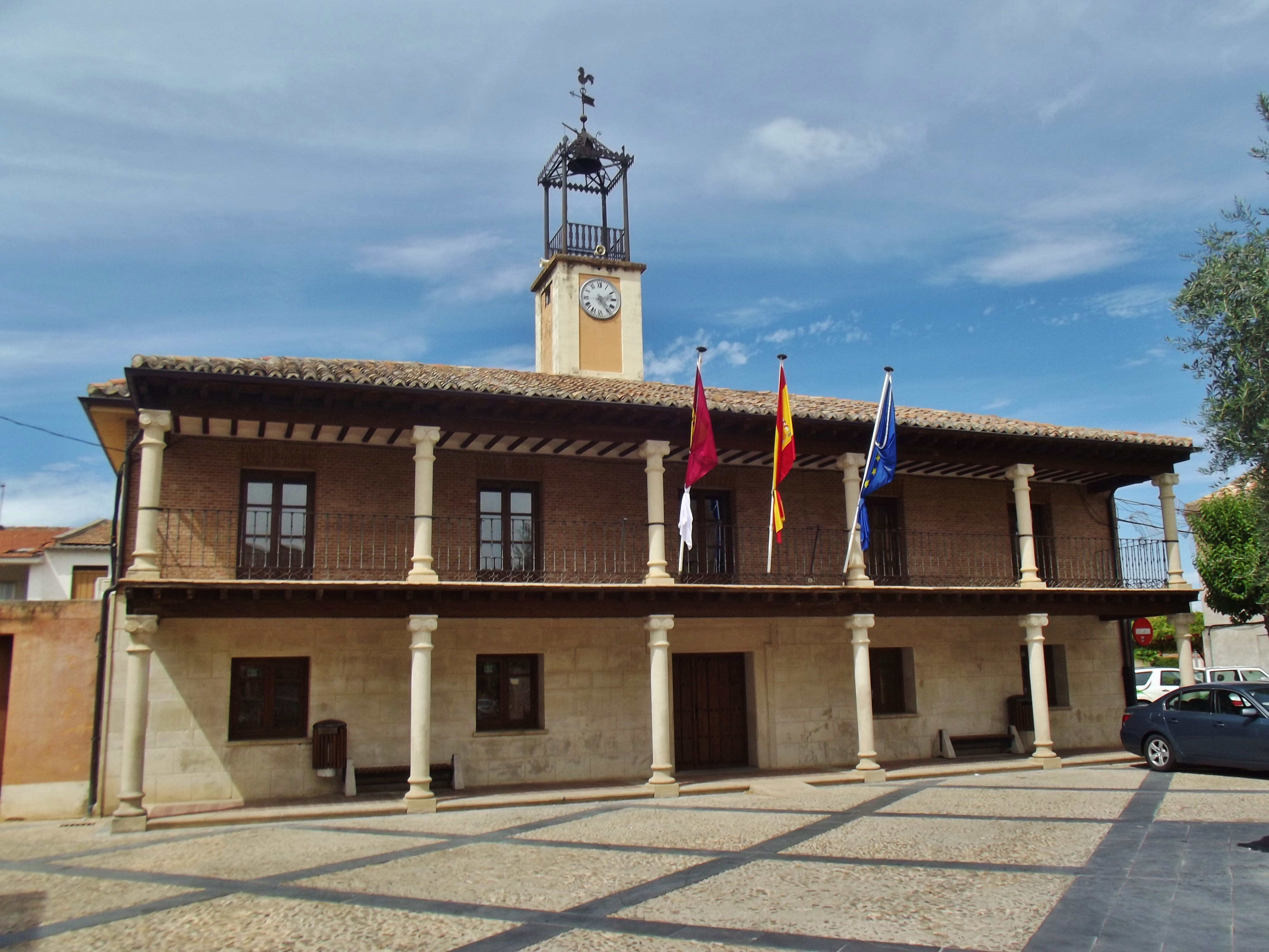 Ayuntamiento de Humanes, provincia de Guadalajara